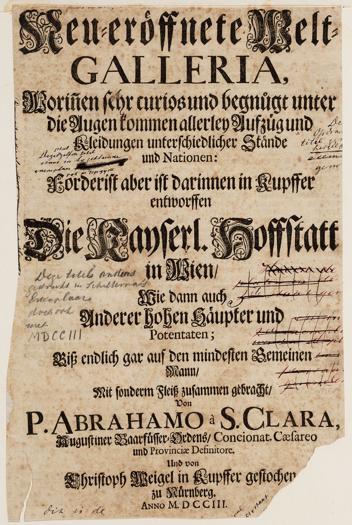 Neu-eröffnete Welt-Galleria by Abraham a Sancta Clara, Title page (engraving by Weigel, Christoph). Amsterdam Museum, Boekillustratoren Jan en Casper Luyken. Transcription: Neu=eroeffnete Welt= GALLERIA, Worinen sehr curios und begnu°gt unter die Augen kommen allerley Aufzueg und Kleidungen unterschiedlicher Staende und Nationen: Forderist aber ist darinnen in Kupffer entworffen Die Kayserl. Hoffstatt in Wien/ Wie dann auch Anderer hohen Haeupter und Potentaten; Biß endlich gar auf den mindesten Gemeinen Mann/ mit sonderm Fleiß zusammen gebracht/ Von P. ABRAHAMO à S. CLARA, Augustiner-Baarfuesser-Ordens/Concionat. Casæreo und Provincæ Definitore, Und von Christoph Weigel in Kupffer gestochen zu Nuernberg. ANNO M.DCCIII.